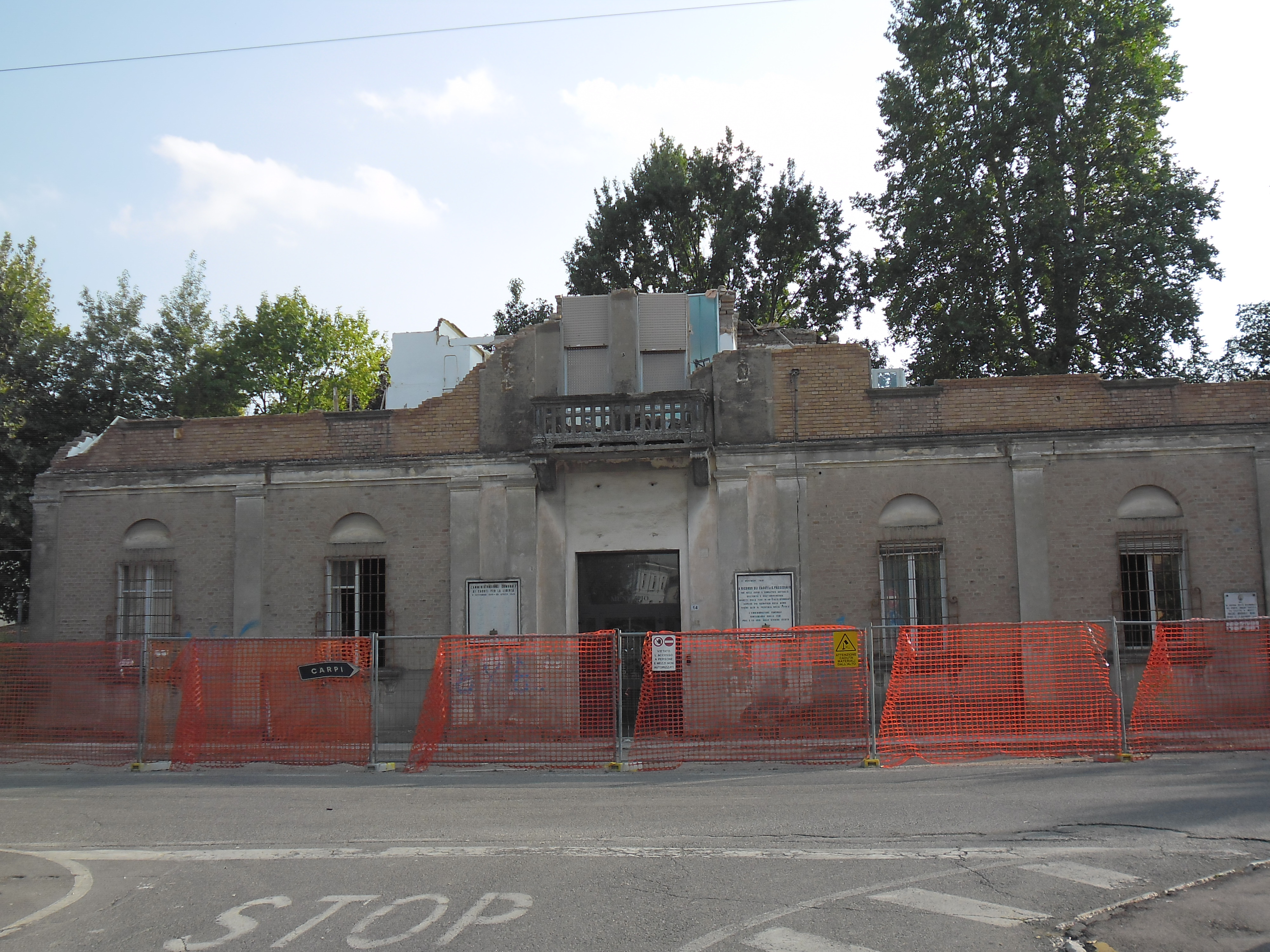 Emiliàn e rumagnòl: Al vèć munìsipi ad San Pusidóni dastrùt da 'l taramòt dal Maǵ dal 2012